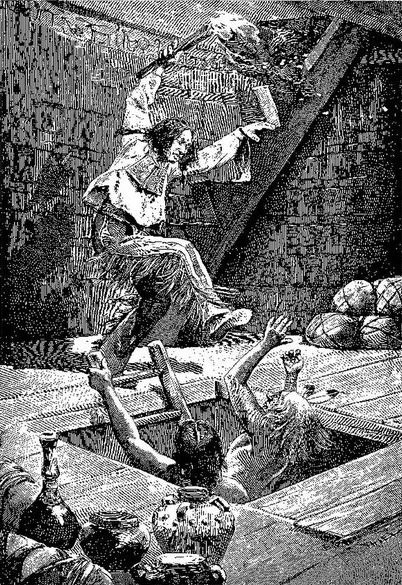 Jugenderzählung; erste Buchausgabe, zweite Covervariante